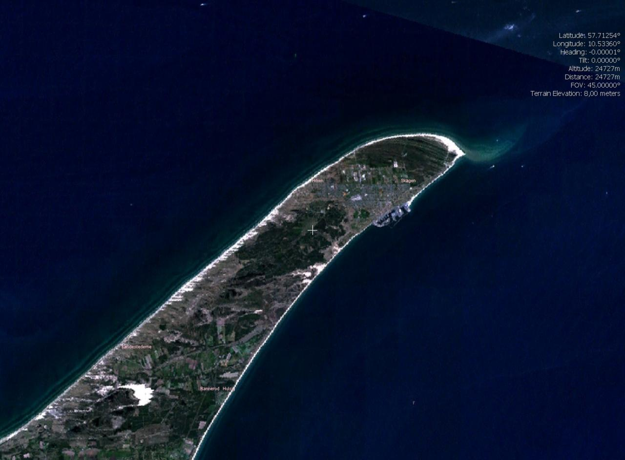 Skagen, Grenen fra NASA-WorldWind "Public domain"